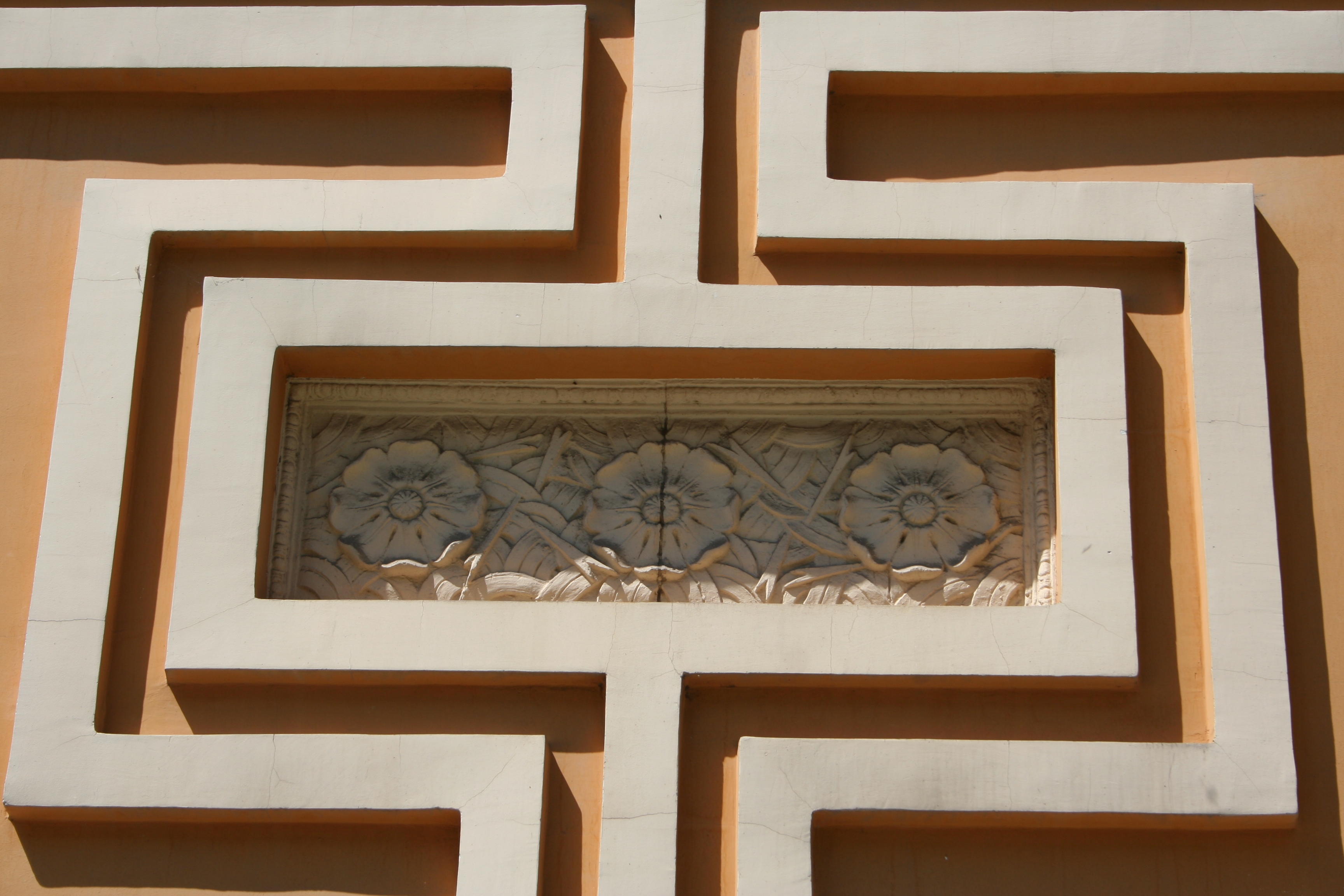 Vukov dom kulture, Loznica